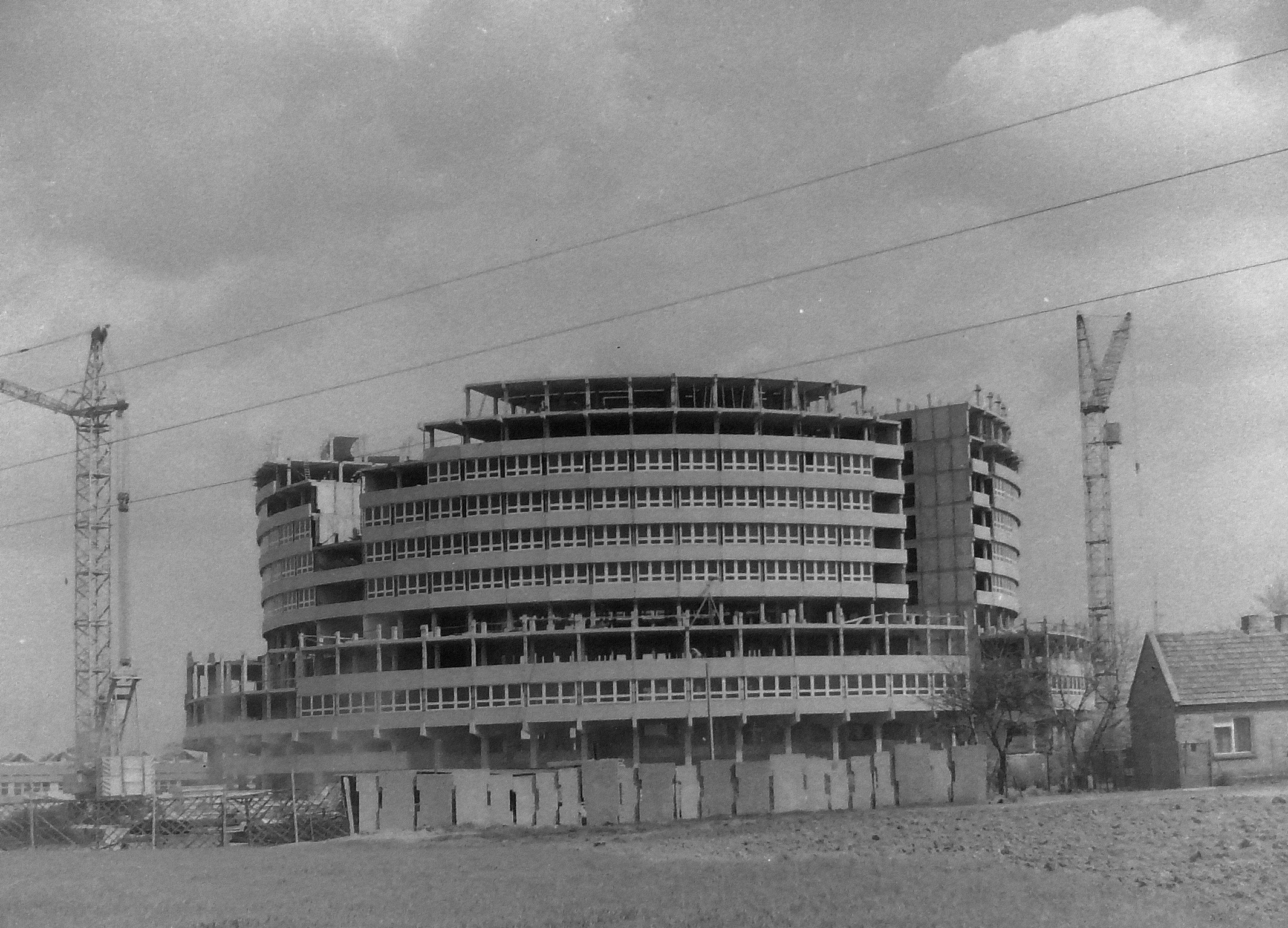 SZPITAL KALISZ /budowa/